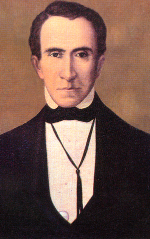 Retrato en óleo de José Joaquín de Olmedo, por Mario Kirby Maldonado.